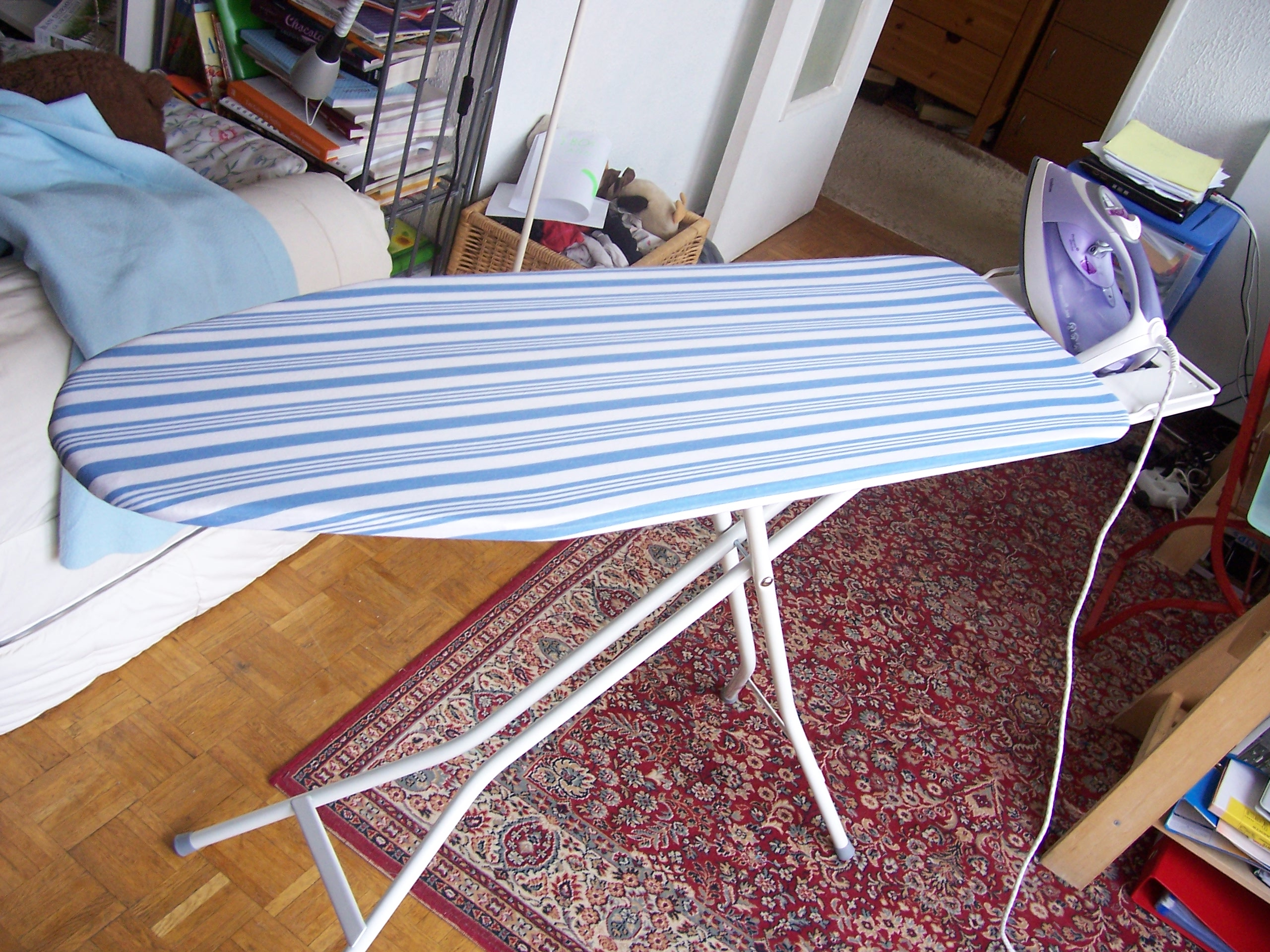 Planche à repasser en 2008, France